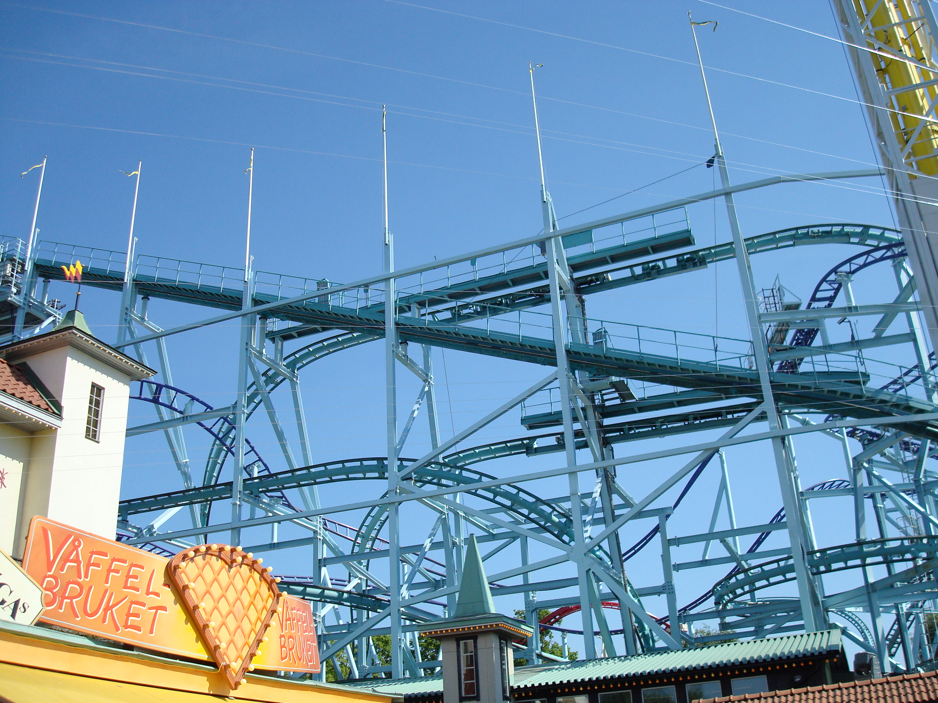 Jetline Gröna Lund 2007-06-09